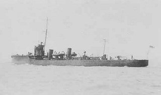 HMS Acheron (1911)